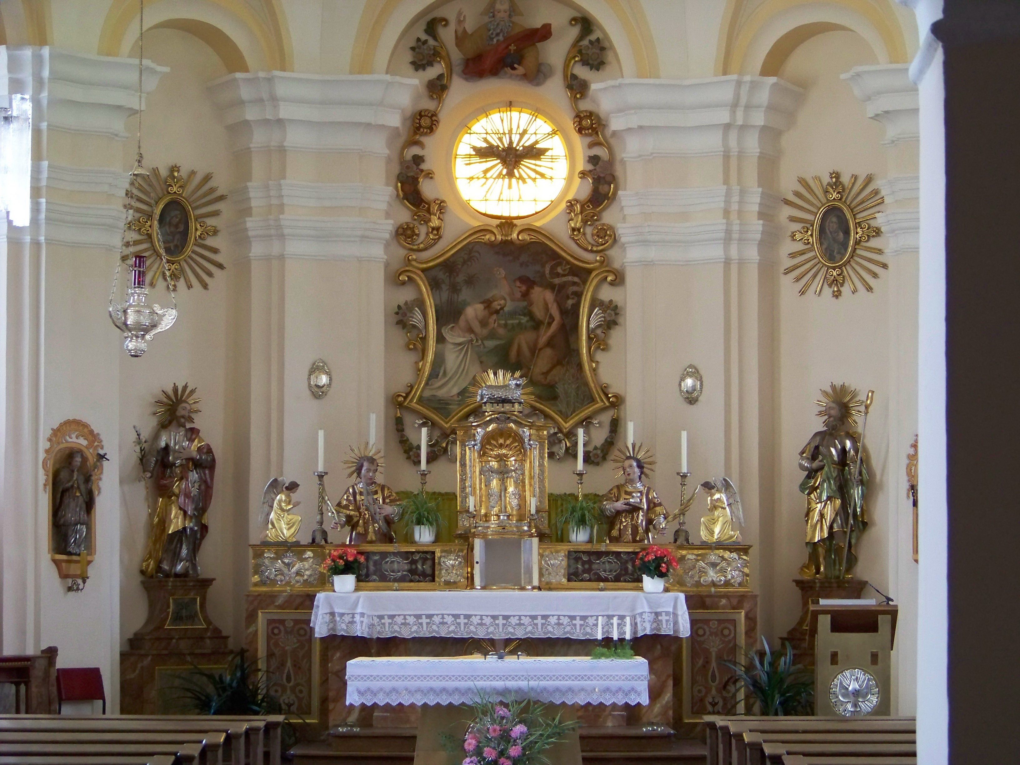 Neufahrn in Niederbayern. Hebramsdorf 5. Filialkirche St. Johannes der Täufer. Erbaut 1730, über älterem Kern; mit Ausstattung. Altarraum.